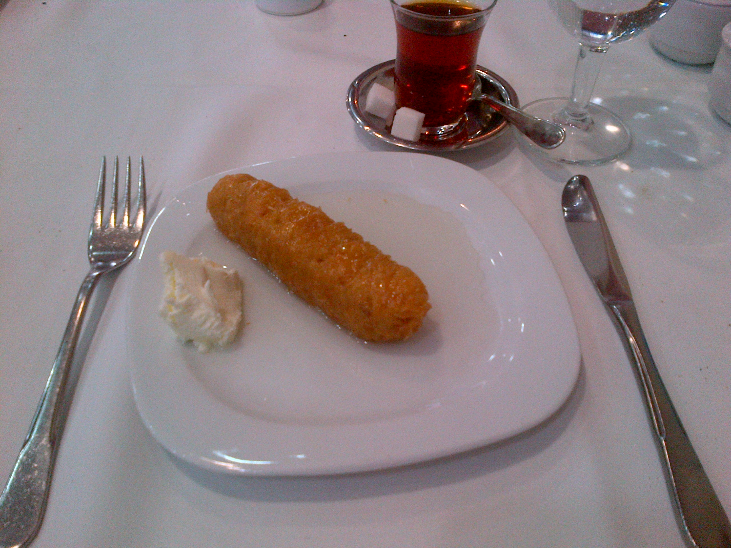 "Kadayıf dolma", con "kaymak" y un vaso de té turco.